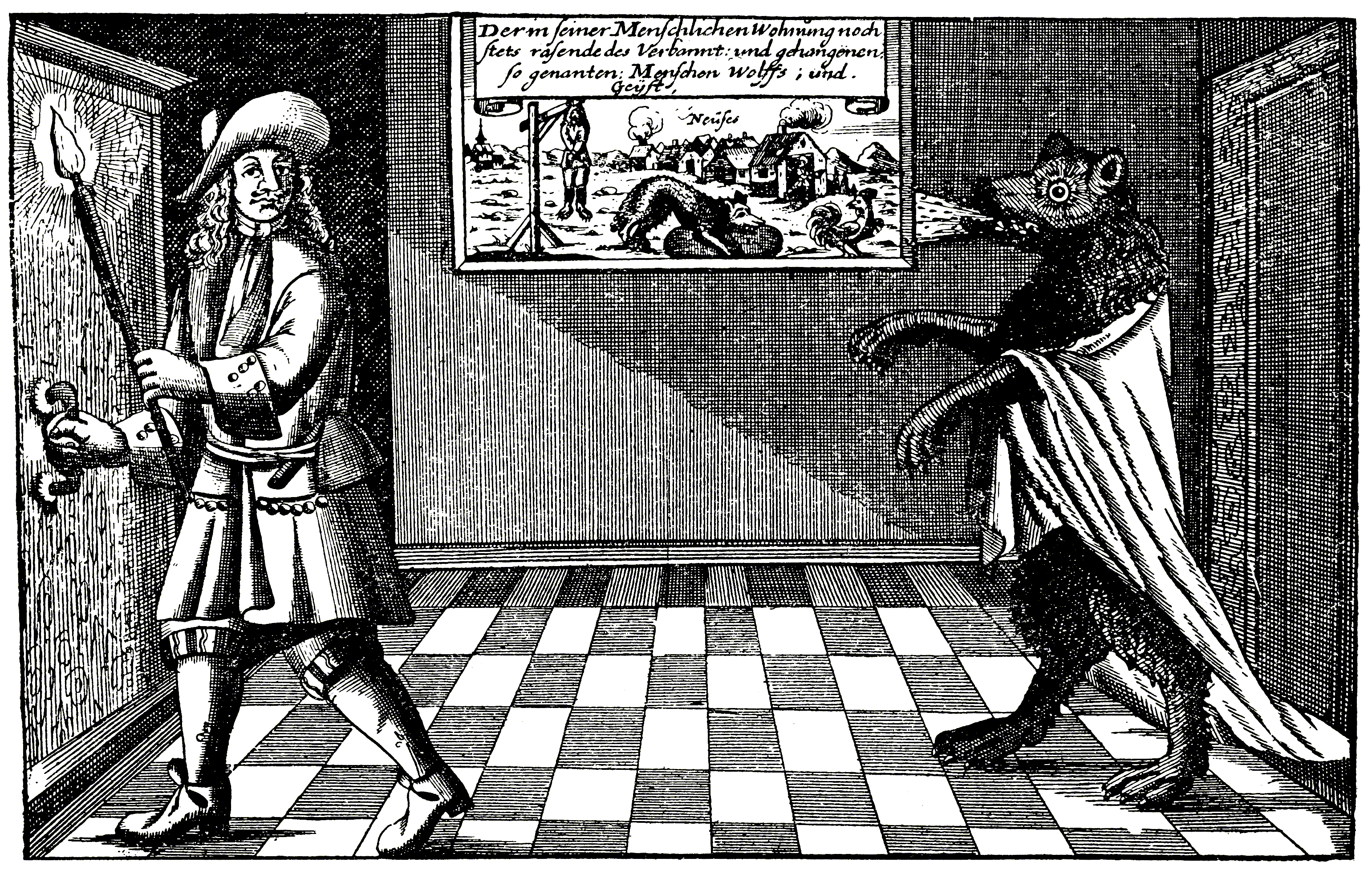 Der Werwolf von Neuses (Marktgrafentum Onolzbach, heute Ansbach). Der betrügerische Pfleger Michael Leicht soll nach seinem Tod in einen Werwolf verwandelt worden sein, aber auch dann noch seinen alten Wohnsitz aufgesucht haben (zeitgenössisches Flugblatt)